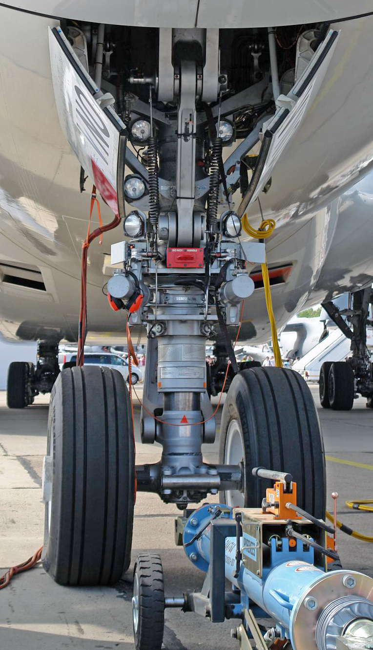 Bugfahrwerk eines Airbus A380 auf der ILA 2008